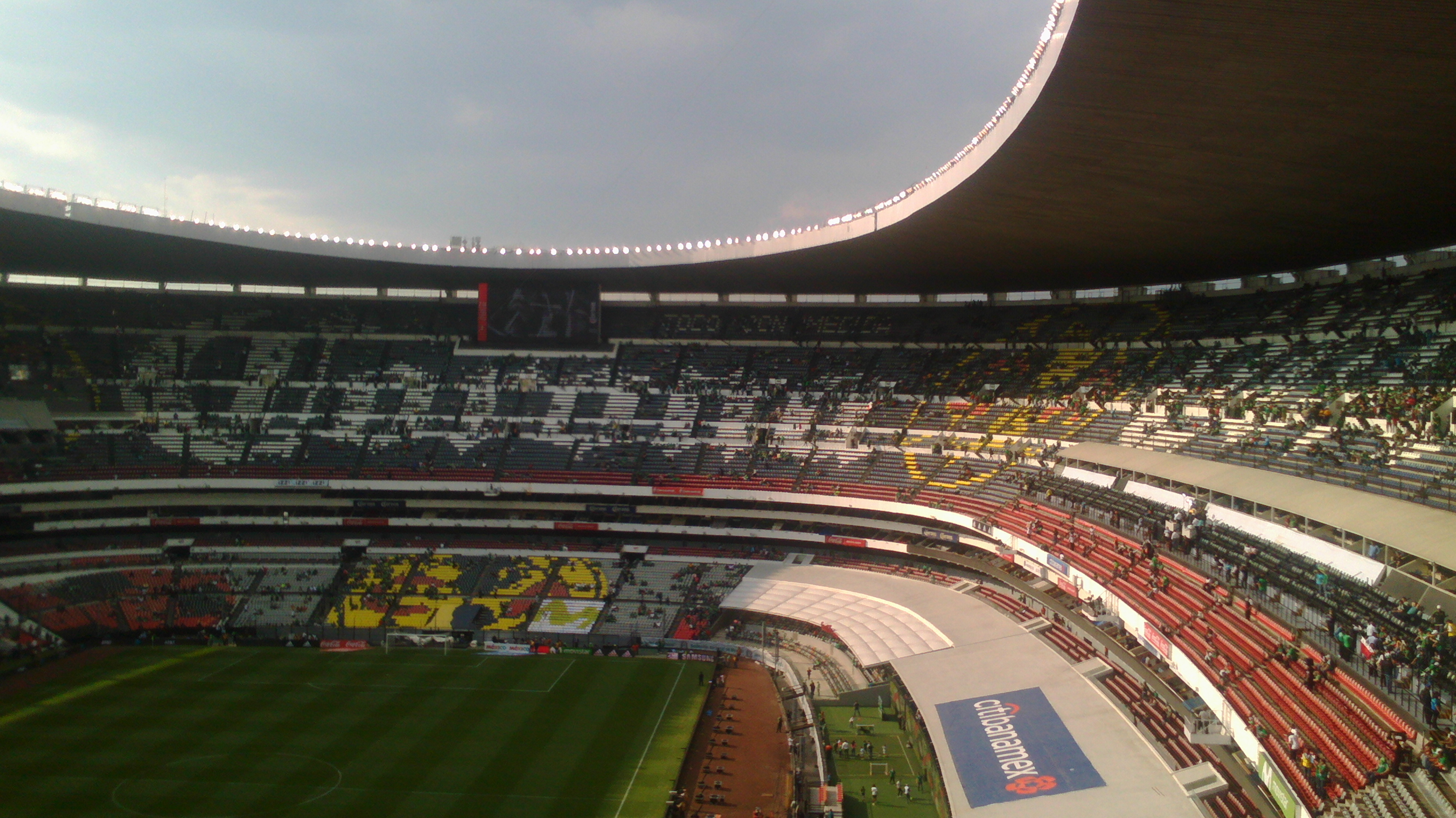 Interior del Estadio Azteca en la Ciudad de México